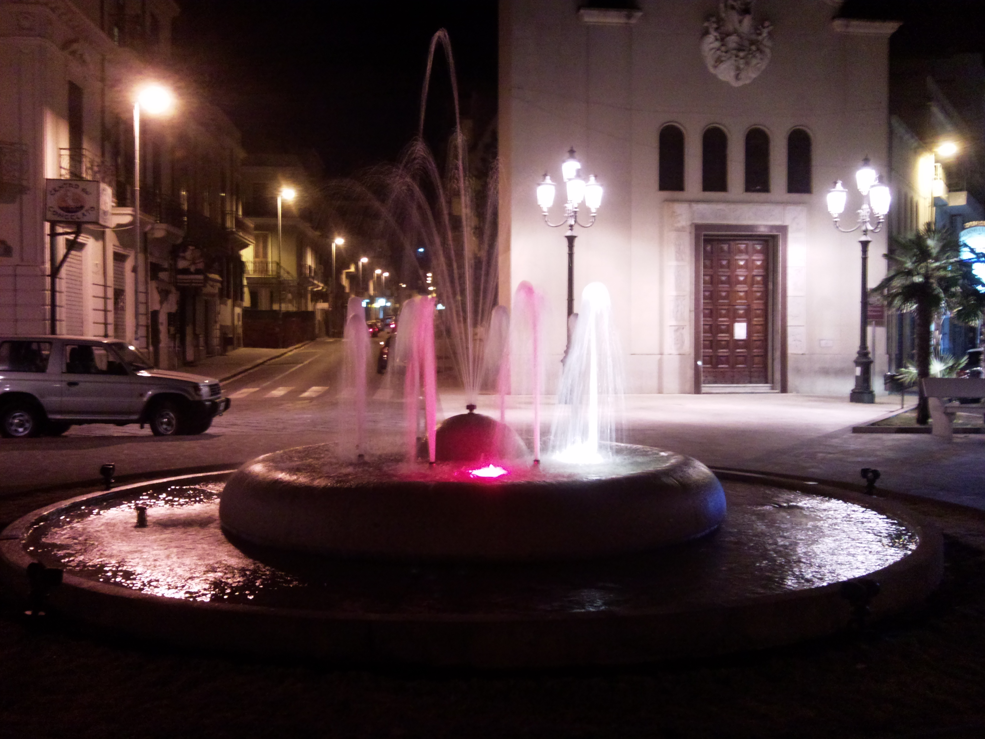 Fontana di Piazza Carmine